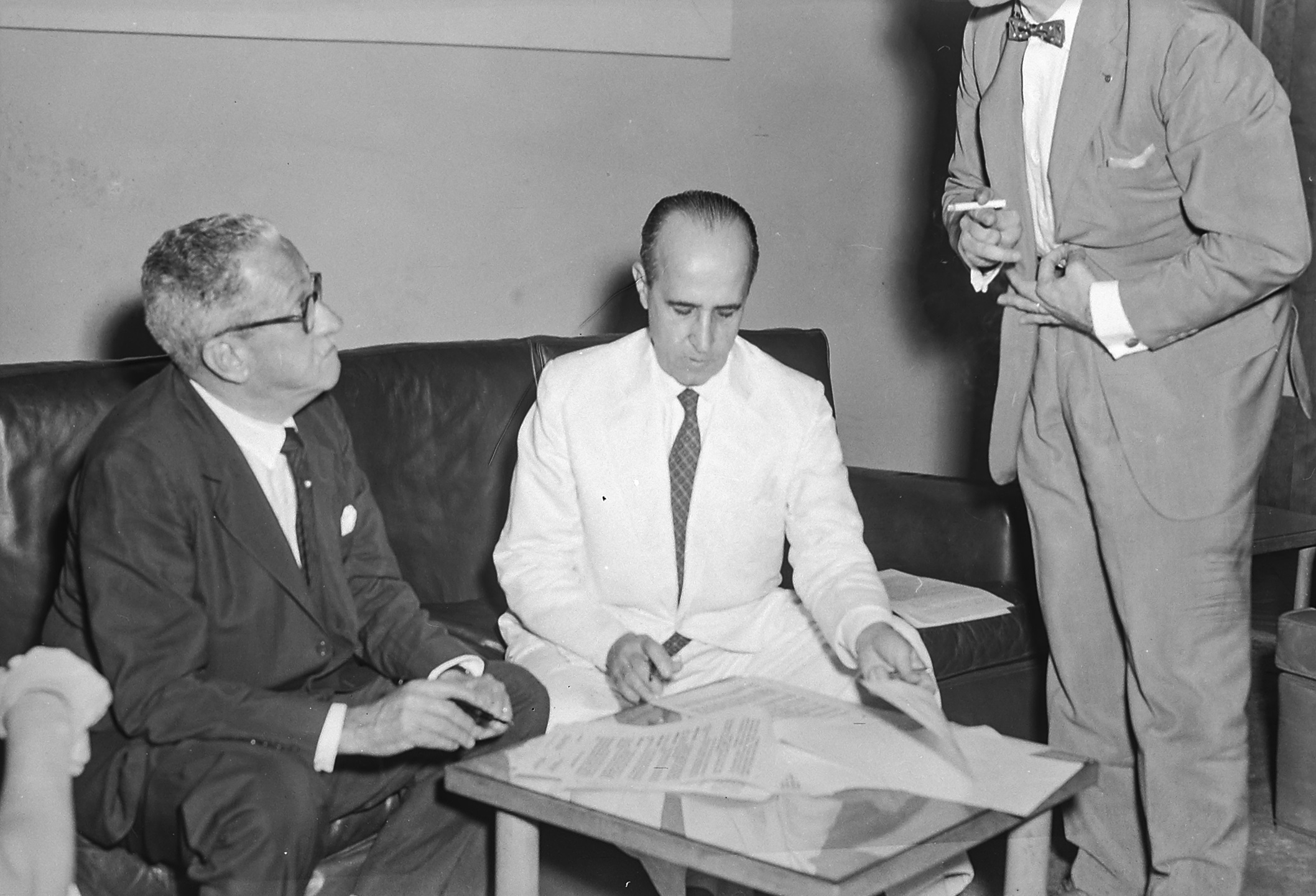 Assinatura de convênio entre a Companhia Urbanizadora da Nova Capital do Brasil (Novacap) e o Ministério da Educação e Cultura, Rio de Janeiro, RJ